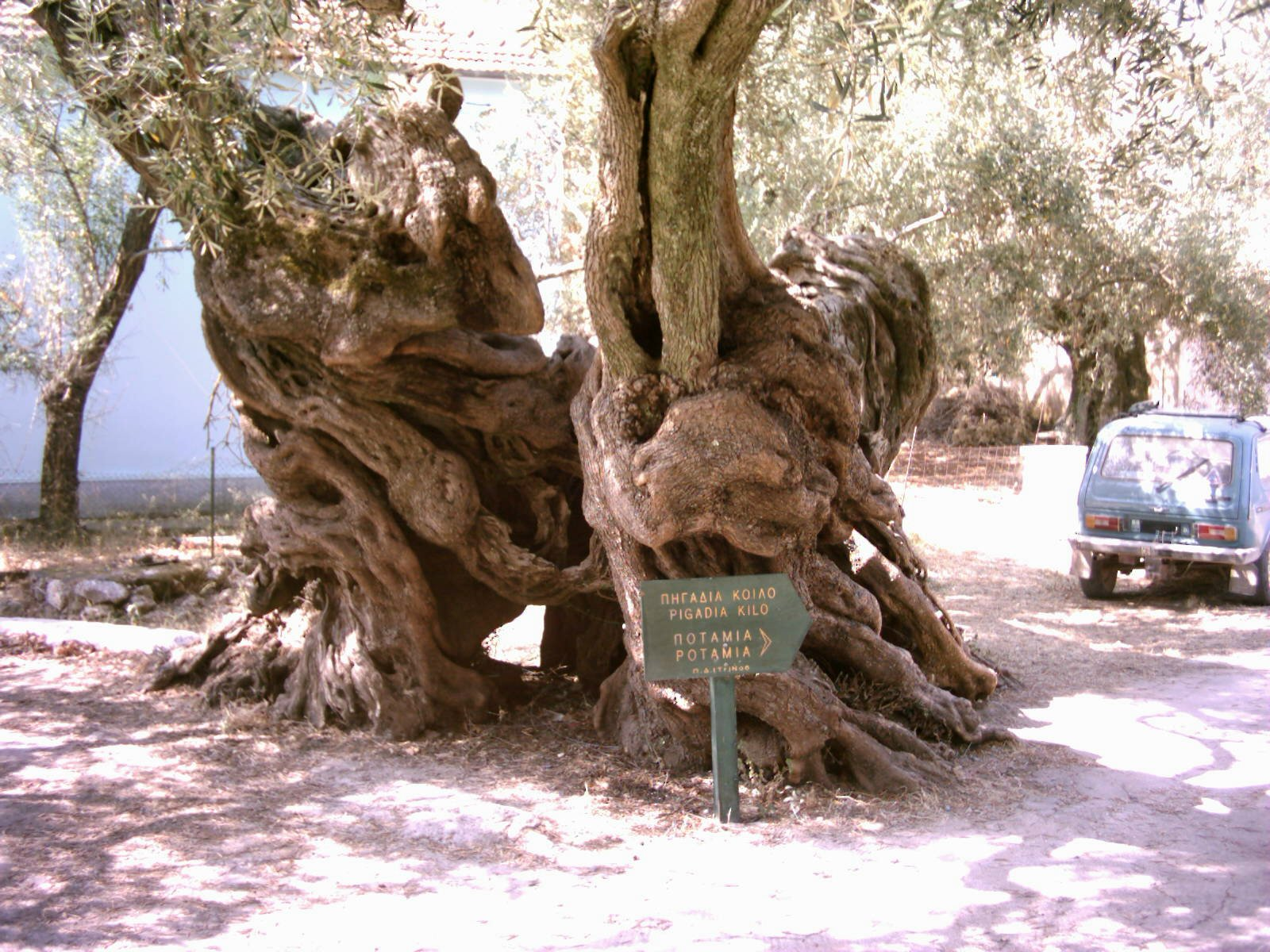 Oude olijvenbomen